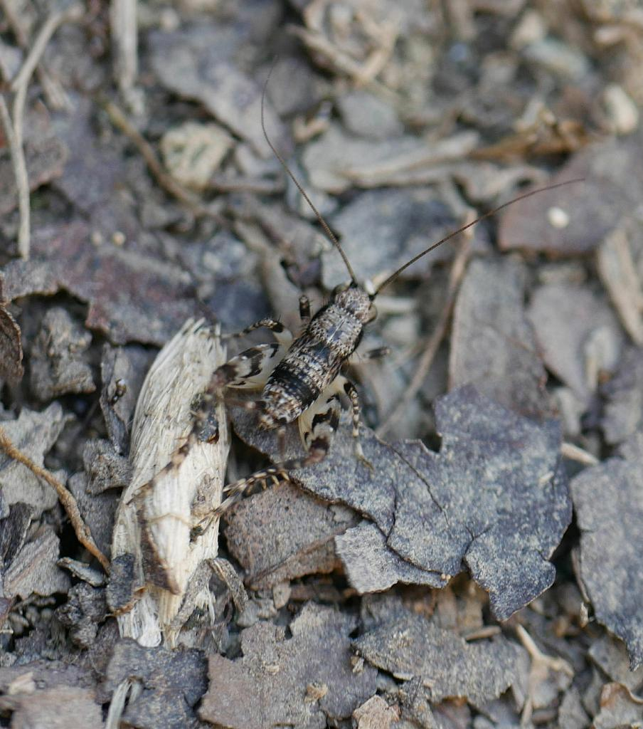 Dianemobius nigrofasciatus：マダラスズ 2018/08/29 和歌山県田辺市：Tanabe City. Wakayama Pref. Japan